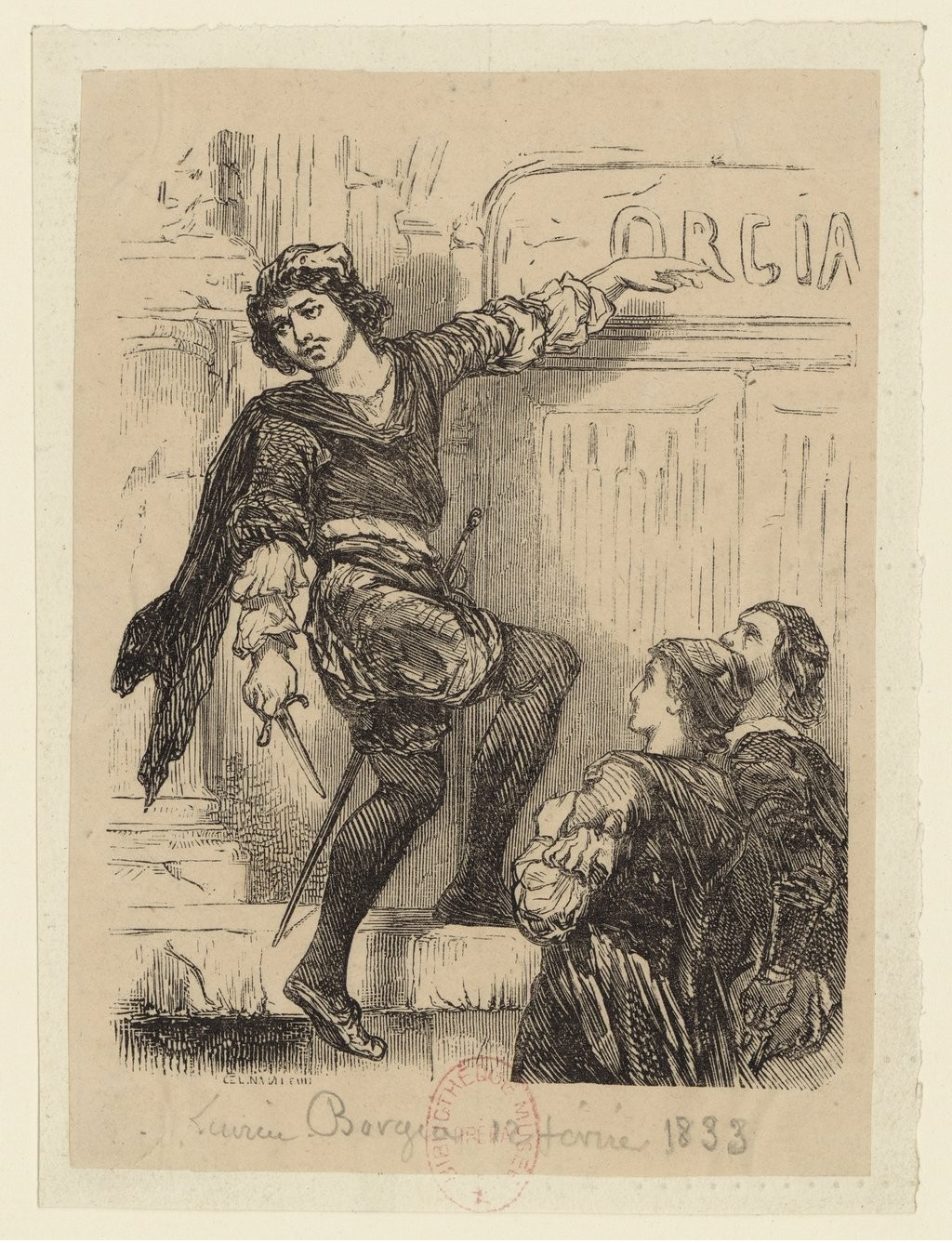 Titre : Lucrèce Borgia : [estampe] / Célestin Nanteuil [sig.] Éditeur : [s.n.] (Paris) Date d'édition : 1833 Format : 1 est. : lithographie ; 14 x 10 cm (im.) Source : Bibliothèque nationale de France, département Bibliothèque-musée de l'opéra, ESTAMPES SCENES LucrèceBorgia (6)